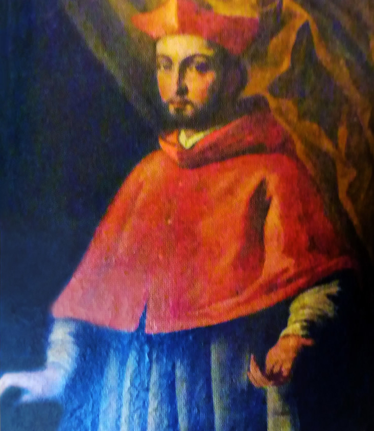 Cardinale Luigi d'Aragona